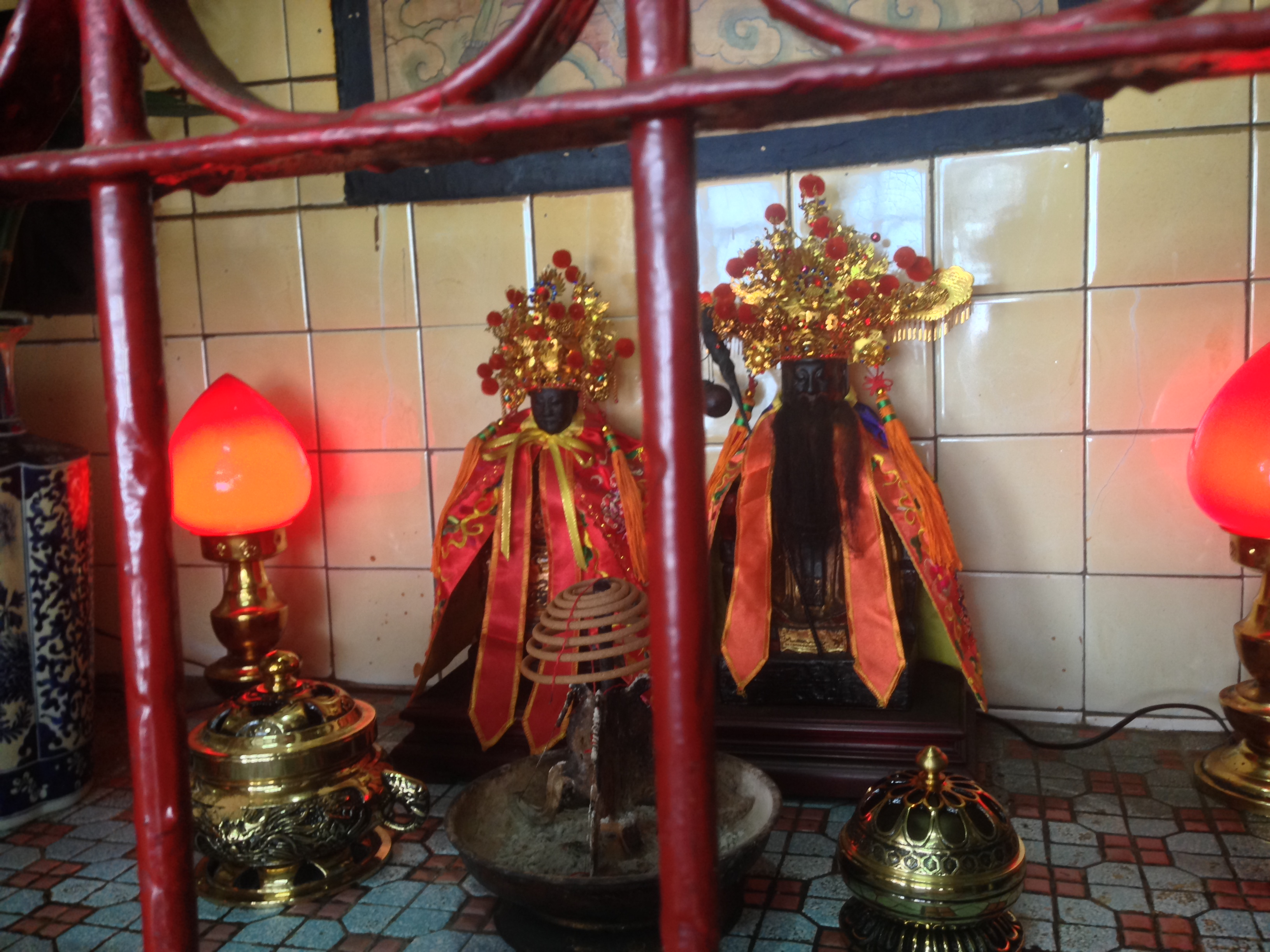 中文（台灣）: 合福祠神像